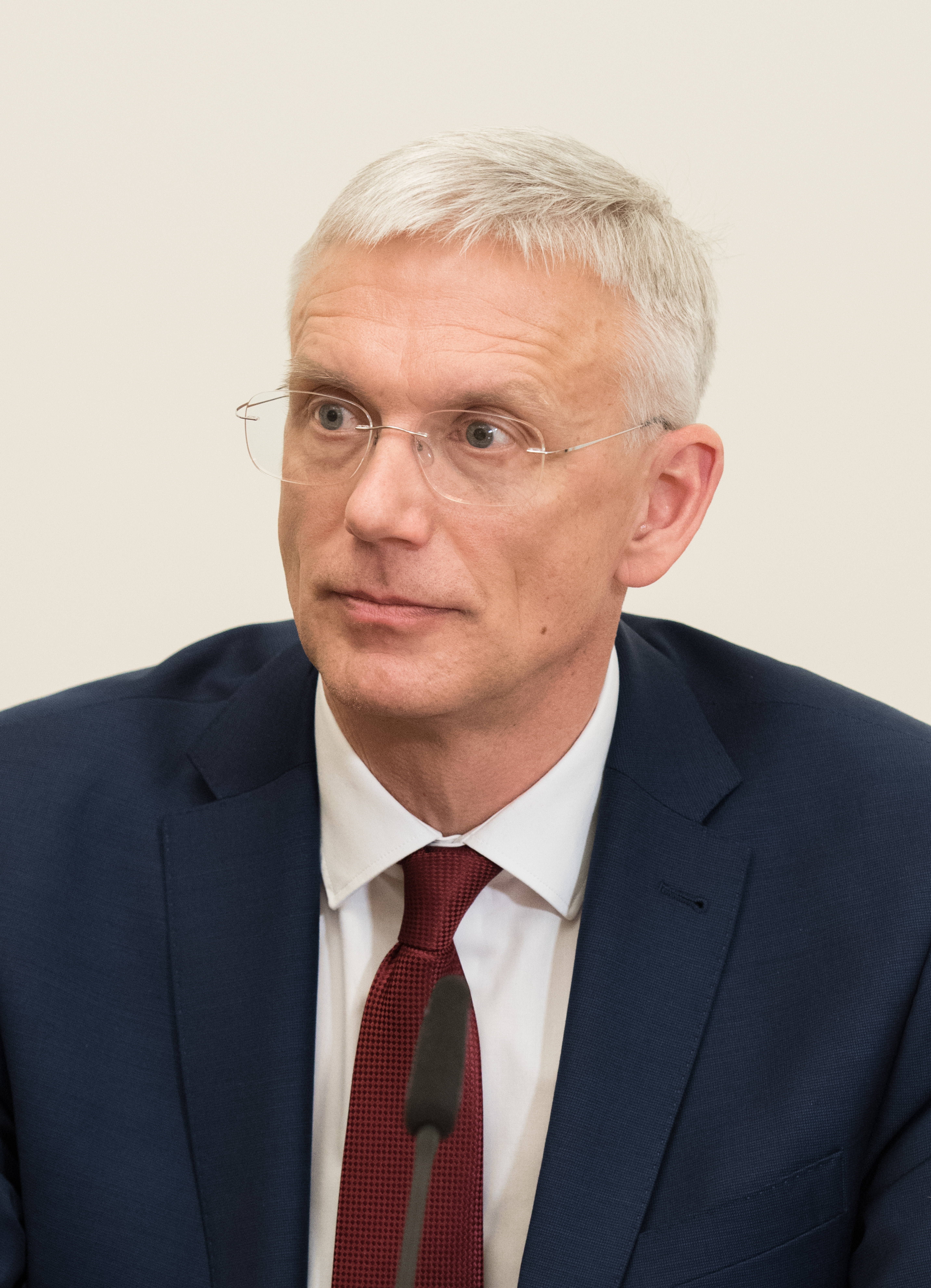 2019.gada 23.janvāris. Krišjāņa Kariņa valdības apstiprināšana Saeimas ārkārtas sēdē. Foto: Ieva Ābele, Saeima Izmantošanas noteikumi: saeima.lv/lv/autortiesibas